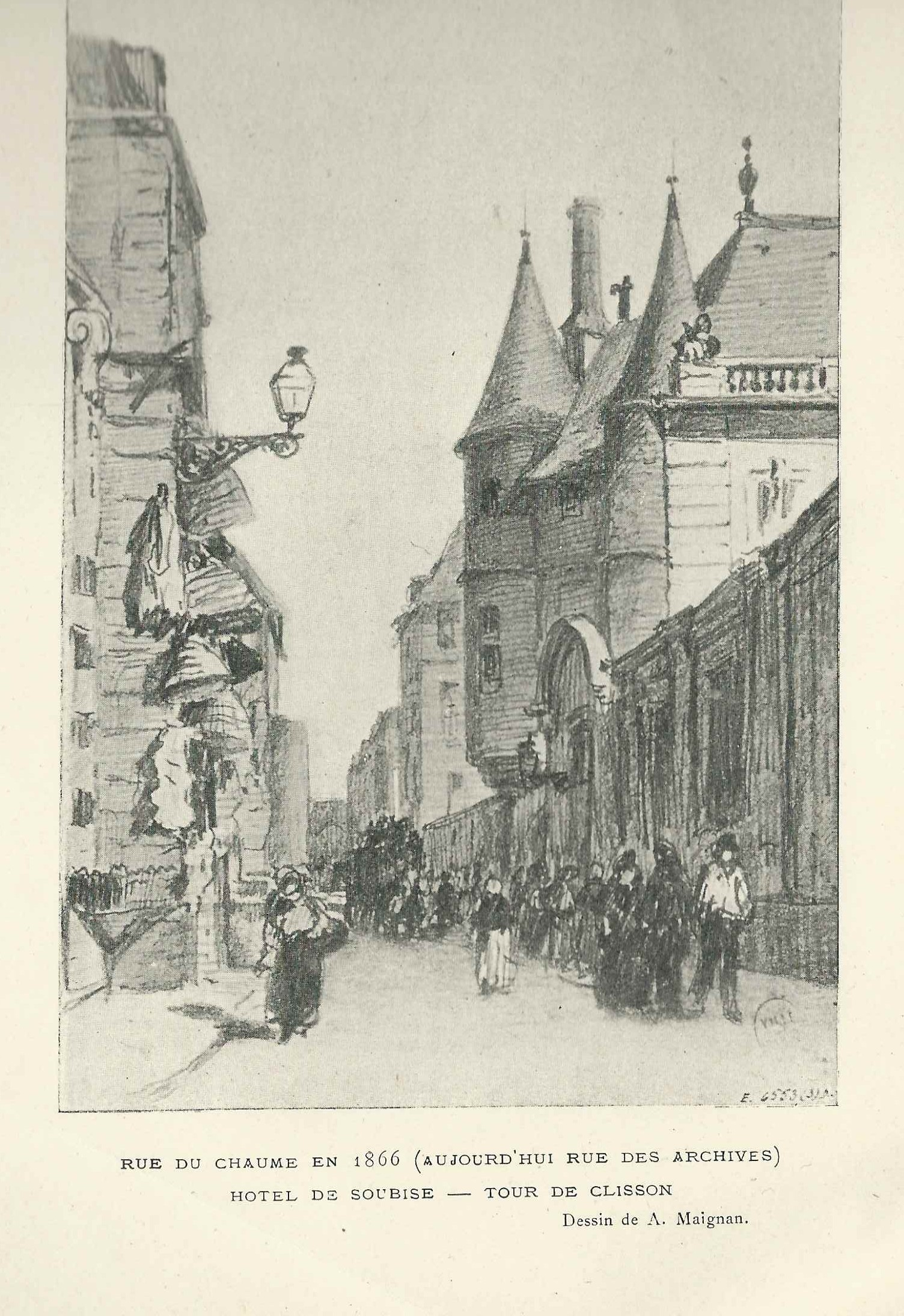 Dessin de A; Maignan pour l'ouvrage de Georges Cain : Coins de Paris - La rue du Chaume, aujourd'hui rue des Archives et l'Hotel de Soubise.